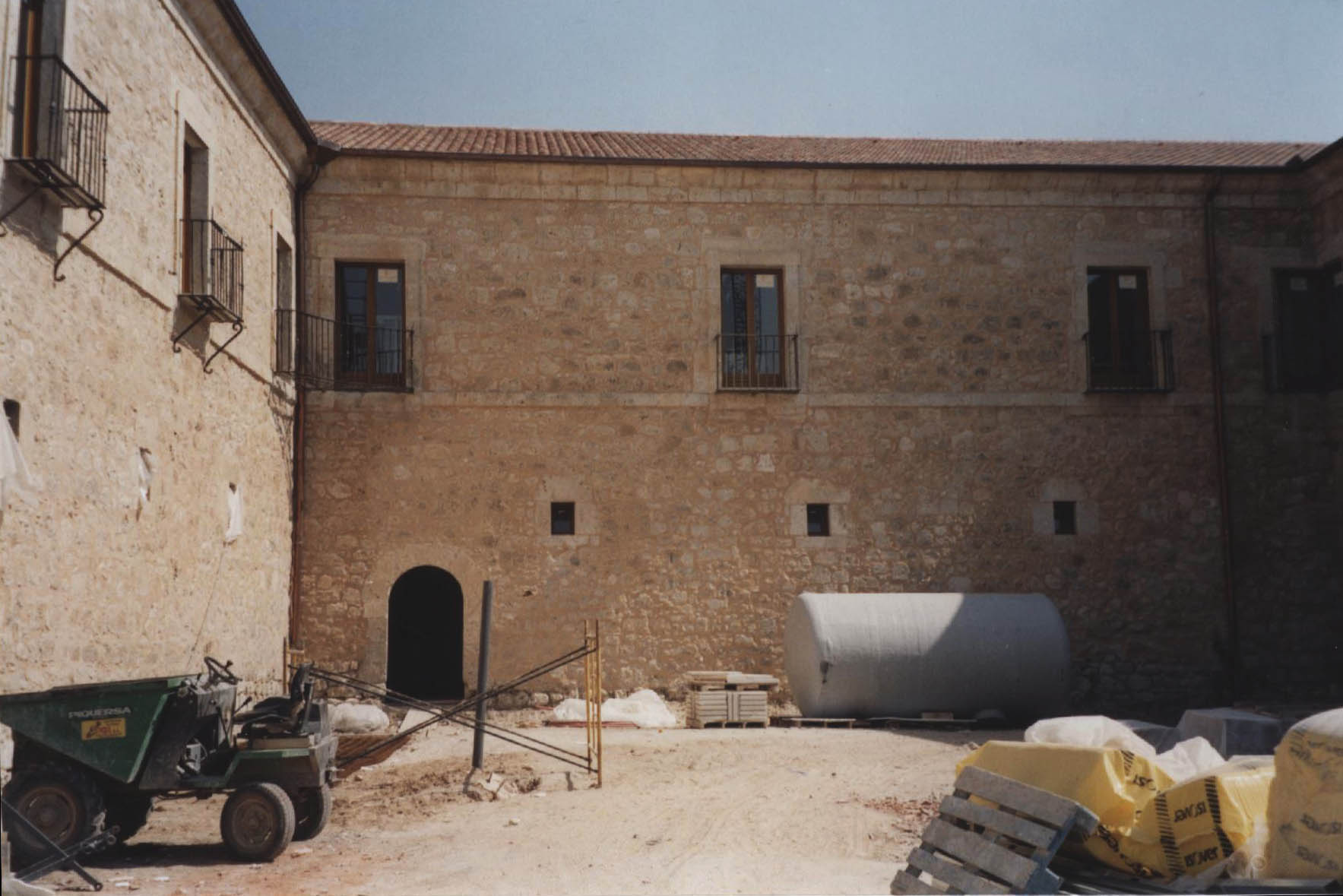 Valladolid, monasterio de Santa María de Valbuena en el término de Valbuena de Duero. Obras de restauración y rehabilitación en el año 2001 a cargo del arquitecto Pablo Puente. Monastery of Valbuena de Duero in Valbuena de Duero Valladolid. Restoration and rehabilitation works by the architect Pablo Puente in 2001.